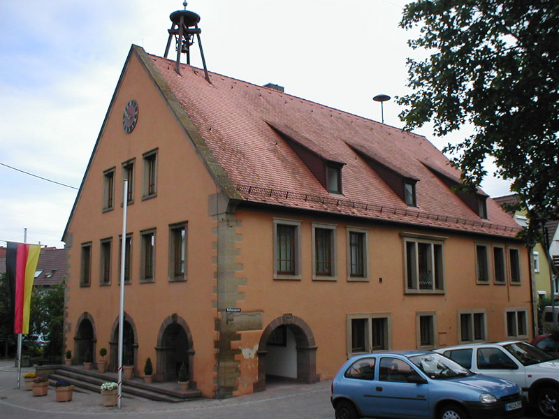 Rathaus in Cleebronn mit Neidfratzen über den Arkaden. Bauwerk datiert zurück auf 1736, wird jedoch erst seit dem 20. Jhd. als Rathaus genutzt.